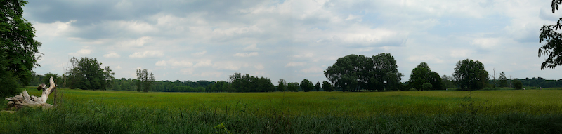 Panoramabild des Moenchbruch